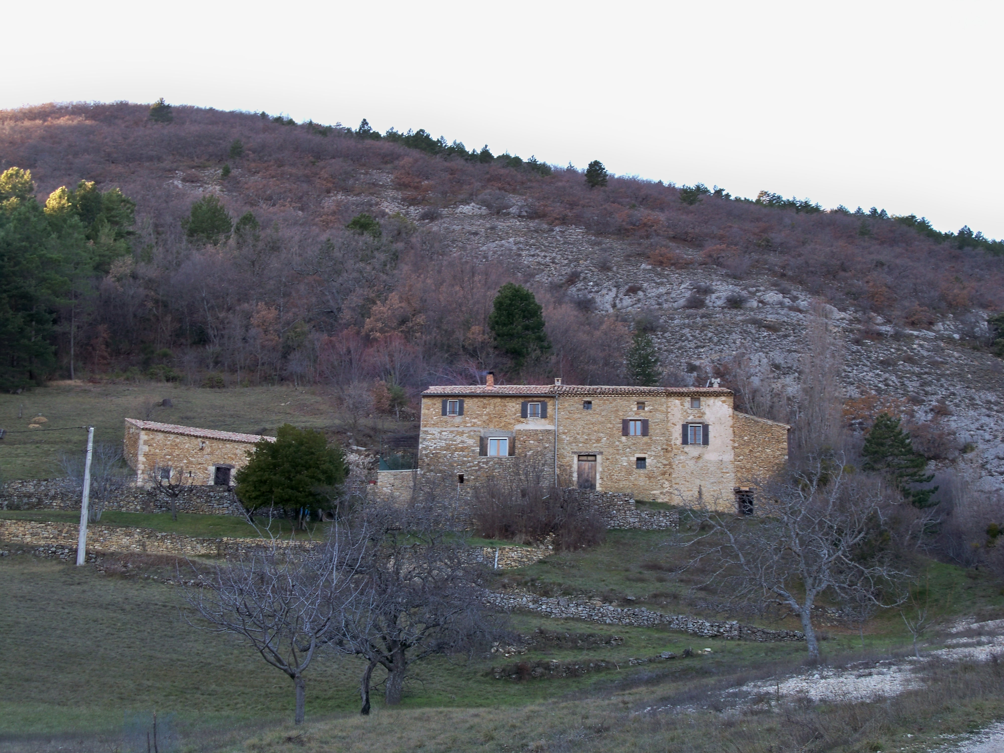 Maison au hameau des Crottes, commune d'Aurel (Vaucluse)